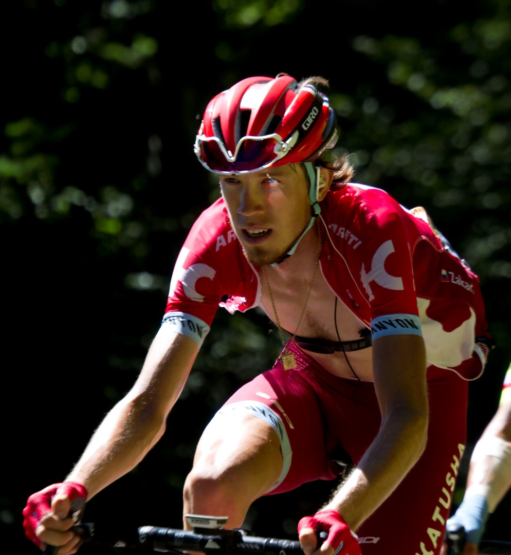 058 zakharin